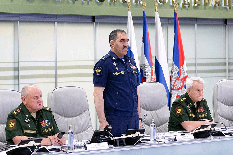 Представление Евкурова на новую должность на заседании высшего руководства министерства обороны России